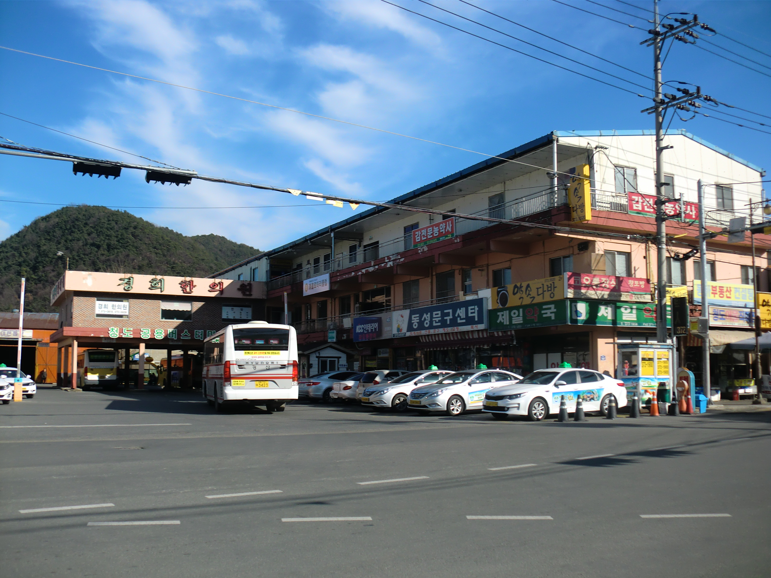 경상북도 청도군에 있는 청도버스터미널